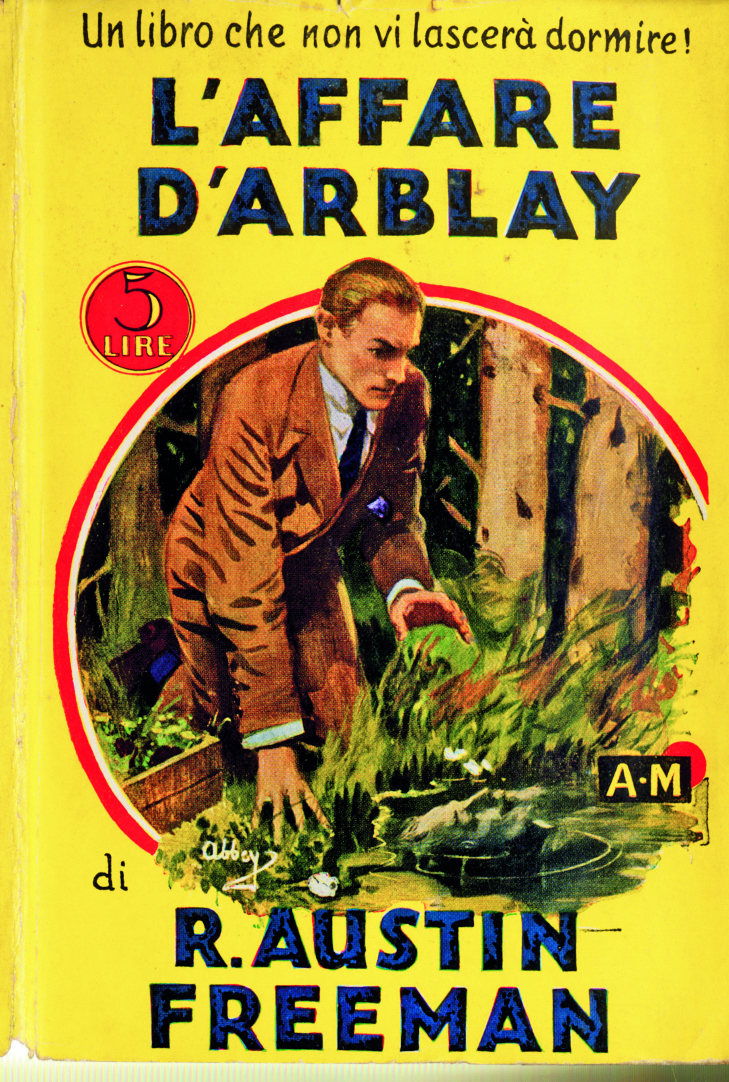 Copertina del romanzo L'affare D'Arblay (The D'Arblay Mystery) di Richard Austin Freeman, nel n.23 de i Gialli Mondadori, la prima collana italiana dedicata alle detective stories, nata nel 1929.